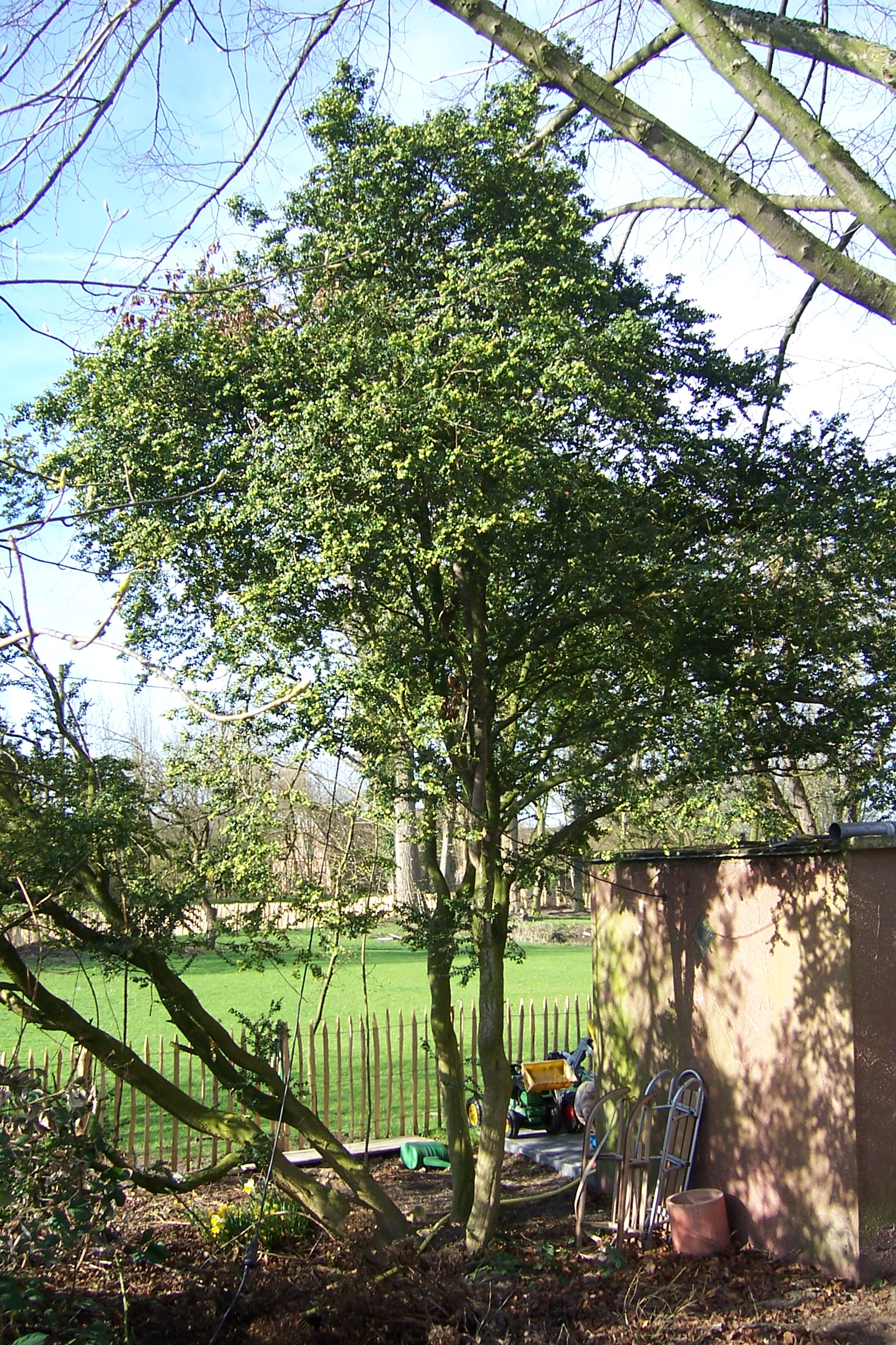 Großer Buchsbaum-Baum an der Vechtebrücke in Ochtrup-Langenhorst, NRW, Germany.